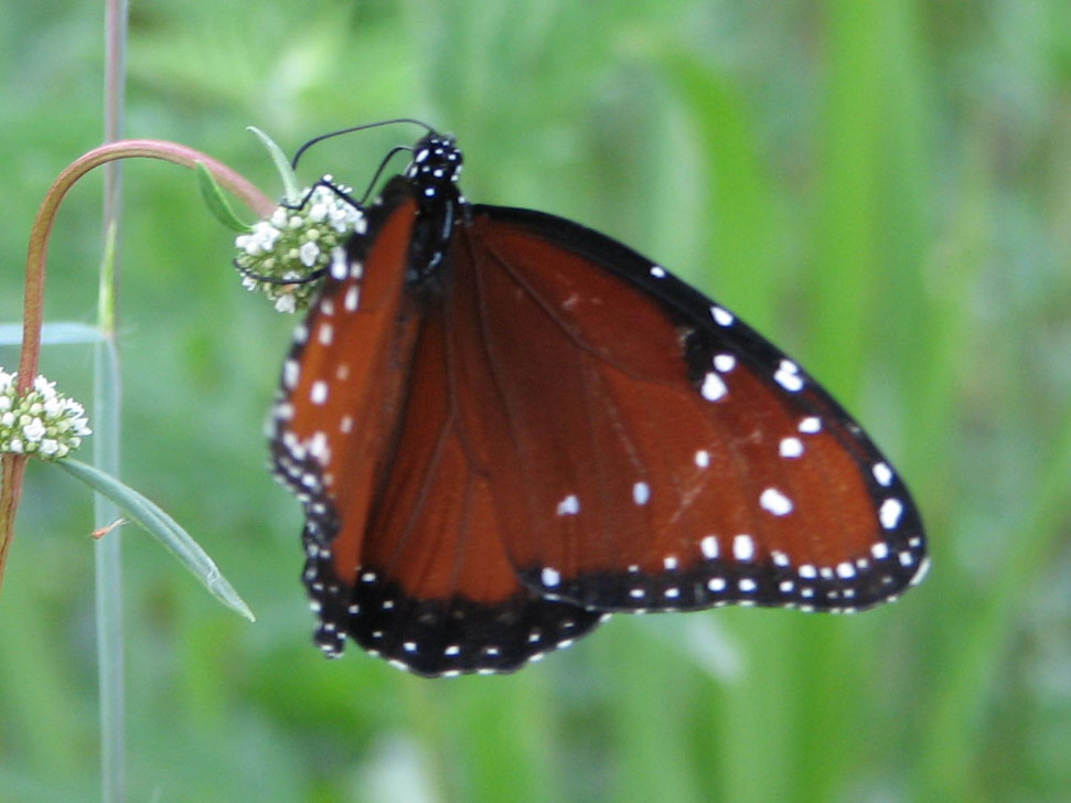 Danaus gillipus (Queen Butterfly)